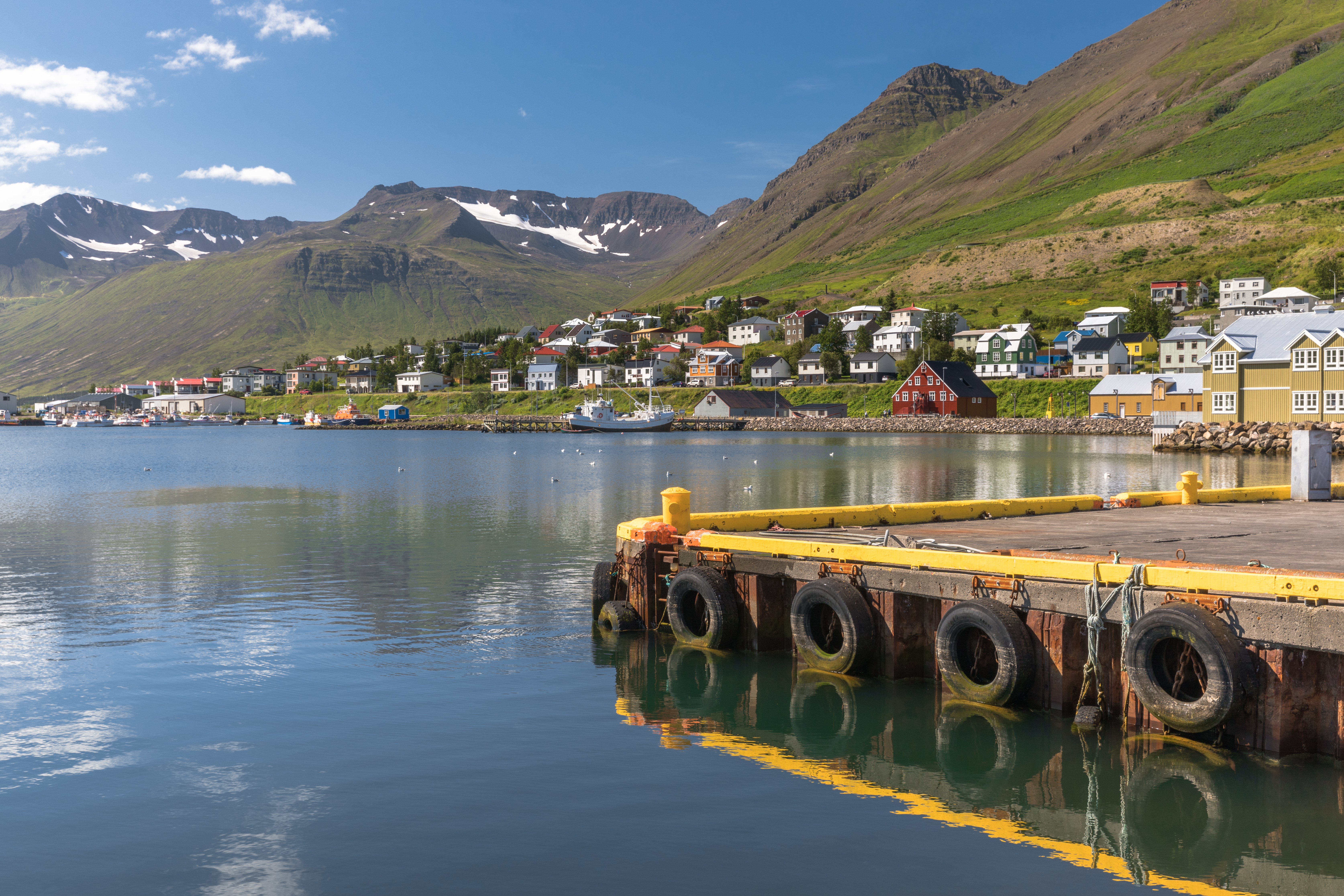 Island_2017_117-0.jpg